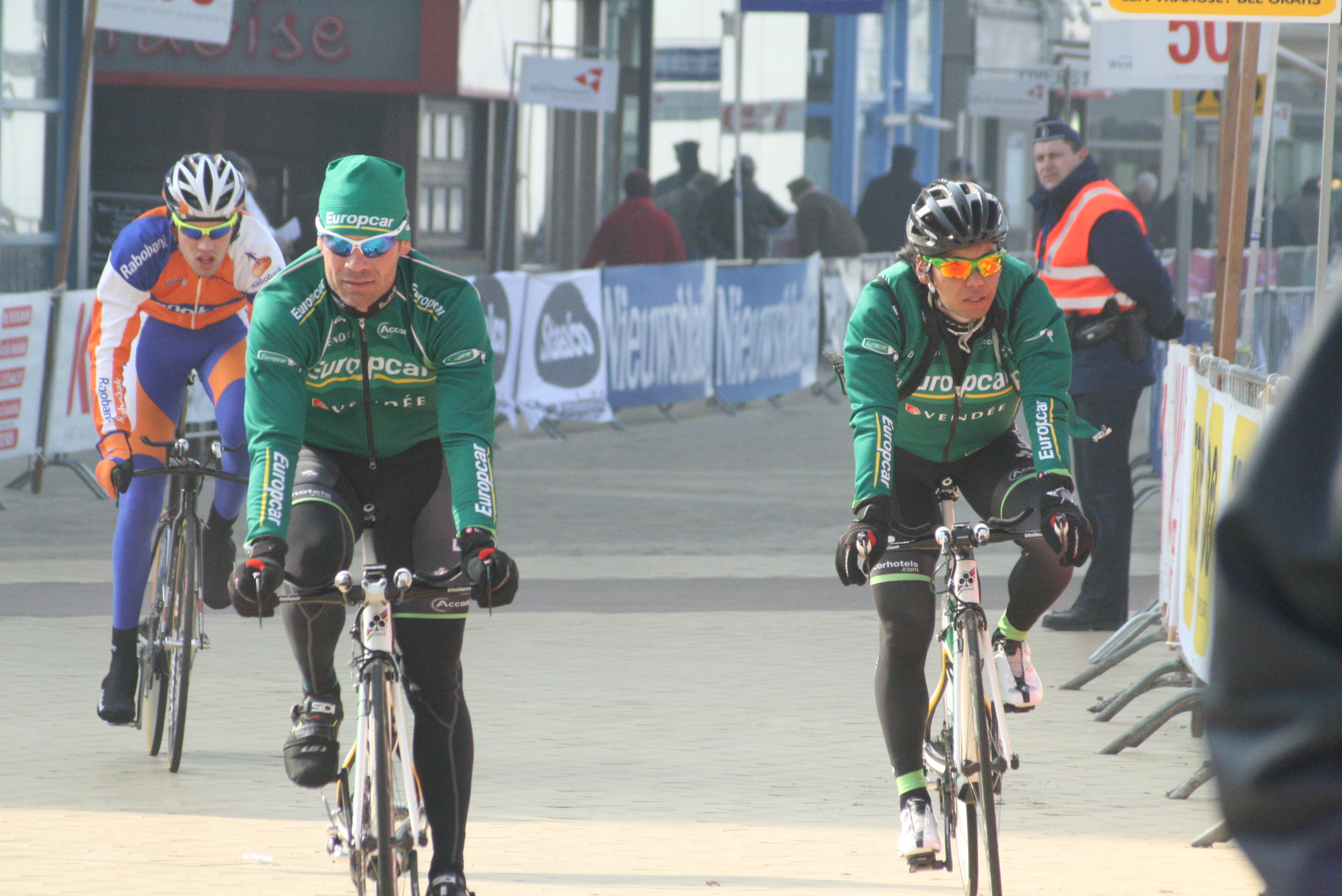 Driedaagse van West-Vlaanderen 2011, proloog in Middelkerke